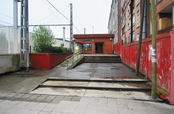 Estación de Zorrotza de Renfe Cercanías - AdifEuskara: Renfe Aldiriak - Adif Zorrotzako geltokia